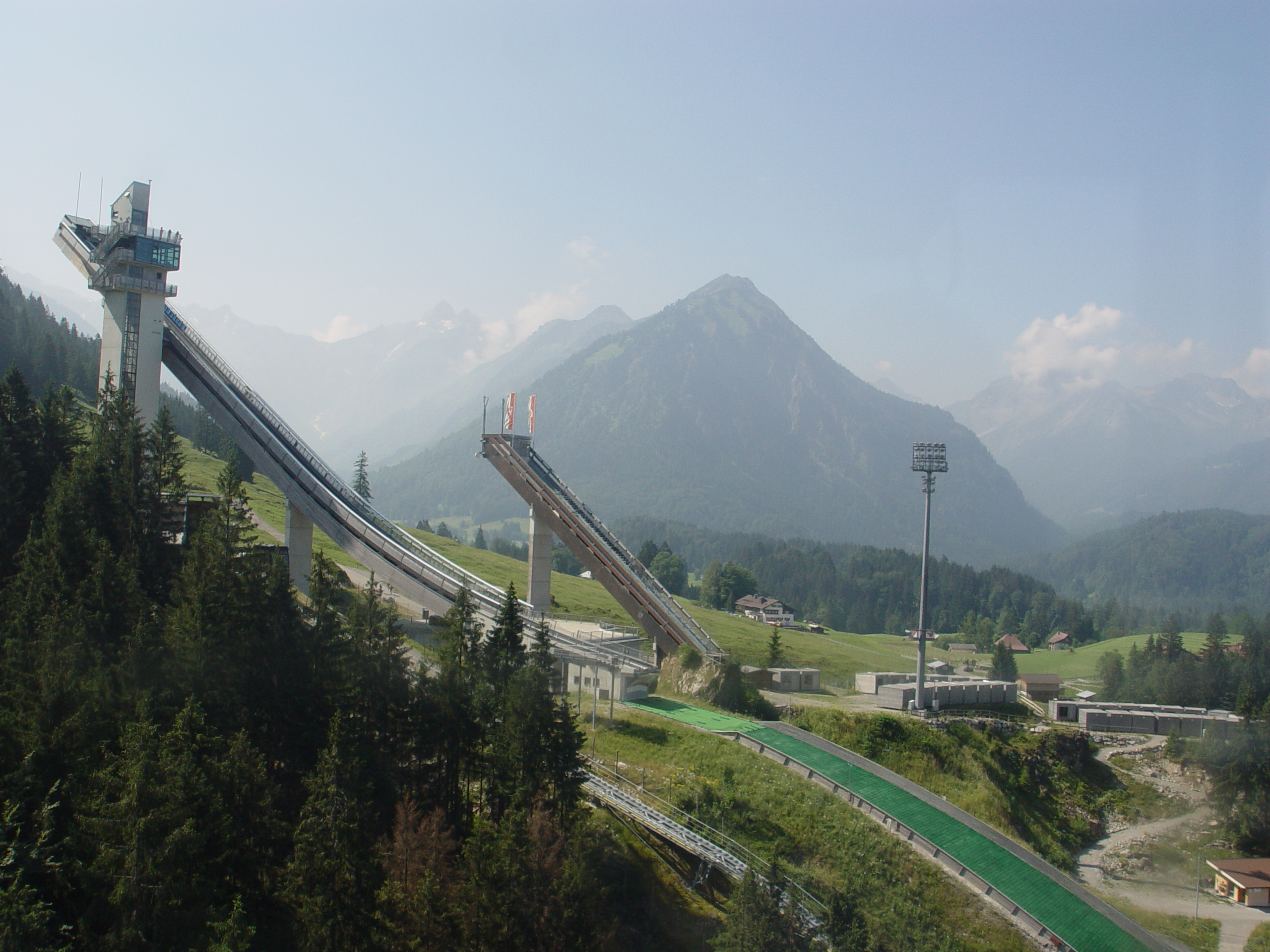 Skisprungschanze von Oberstdorf im Sommer